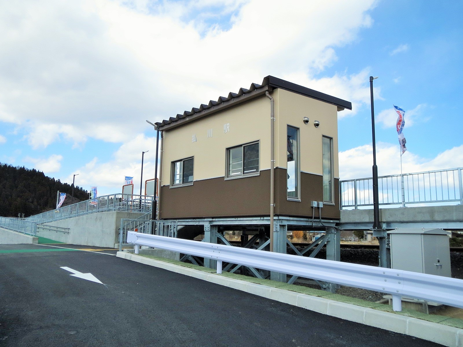 設置直後の払川駅 Canon IXY 3